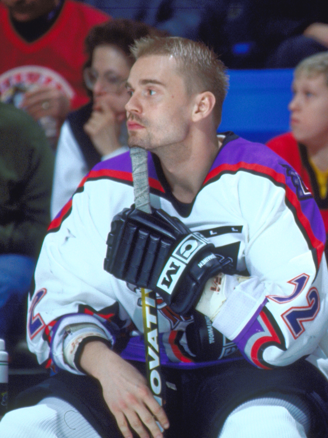 ahlstar0066